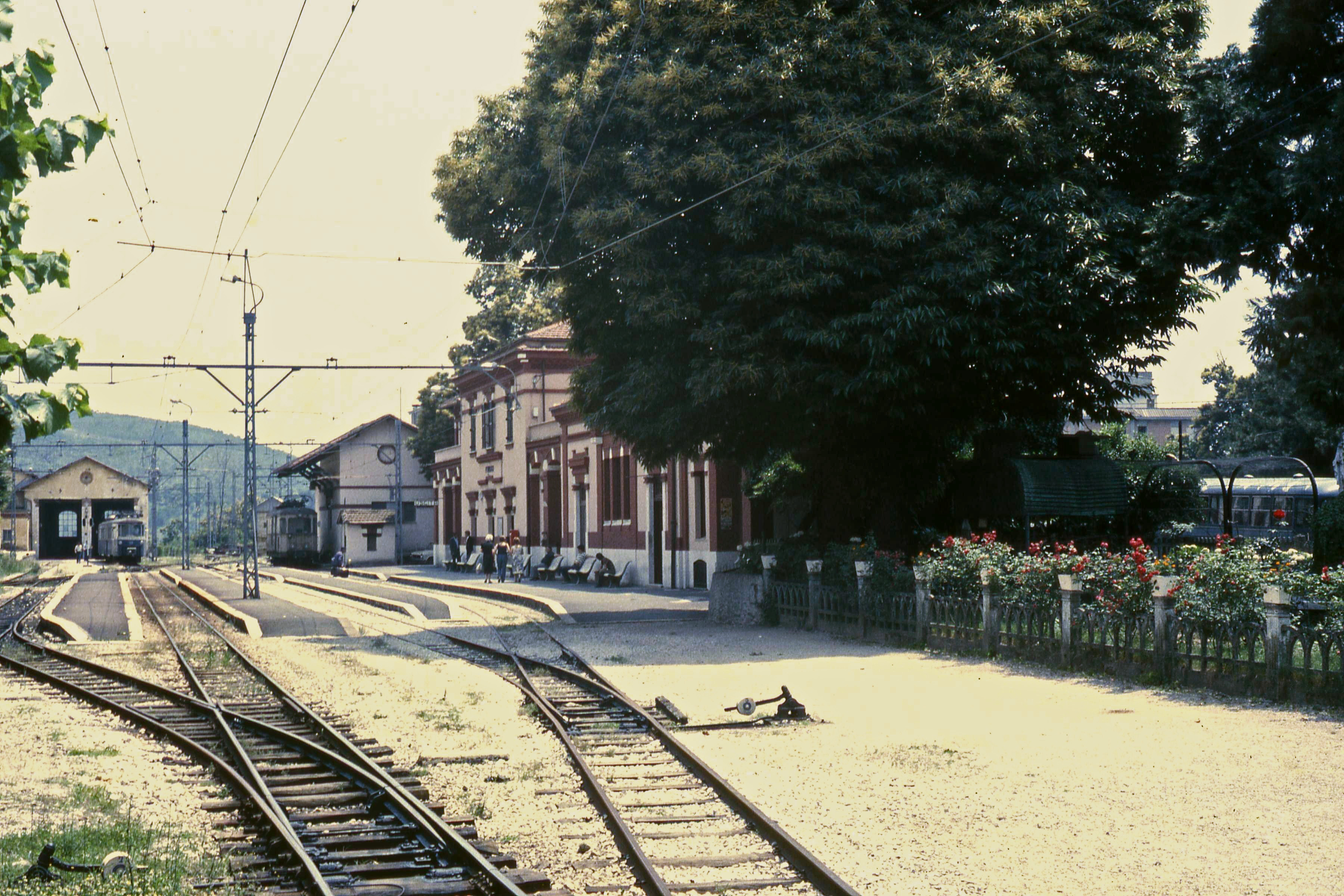 Fiuggi station in 1979. Stationsgebouw bestaat nog